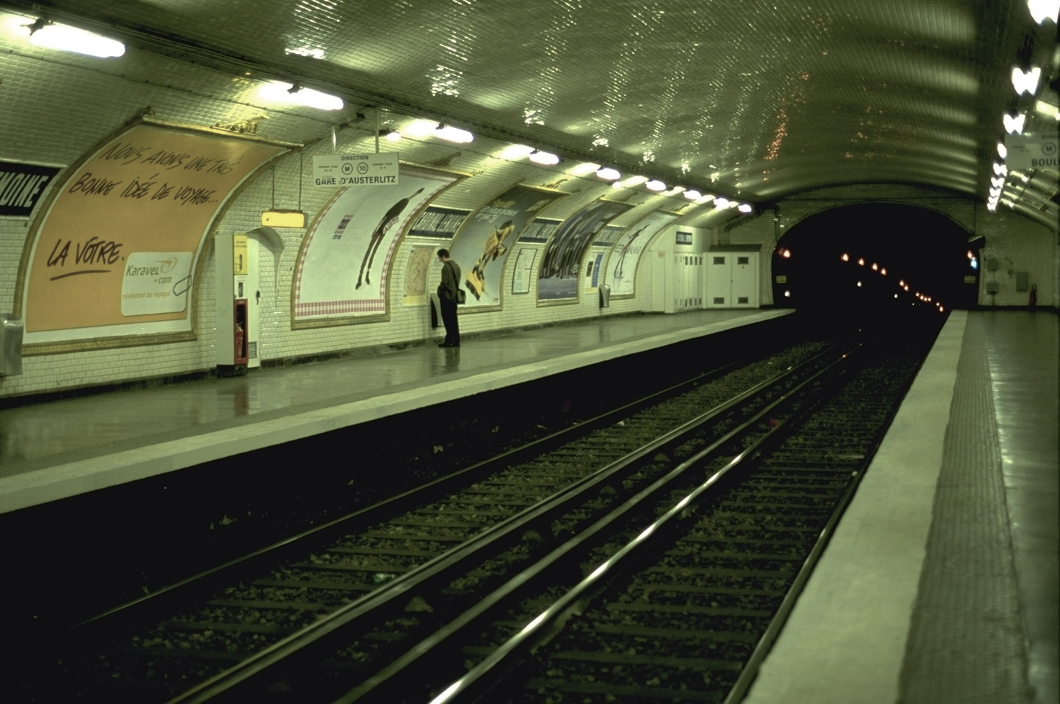 Cardinal Lemoine metro station